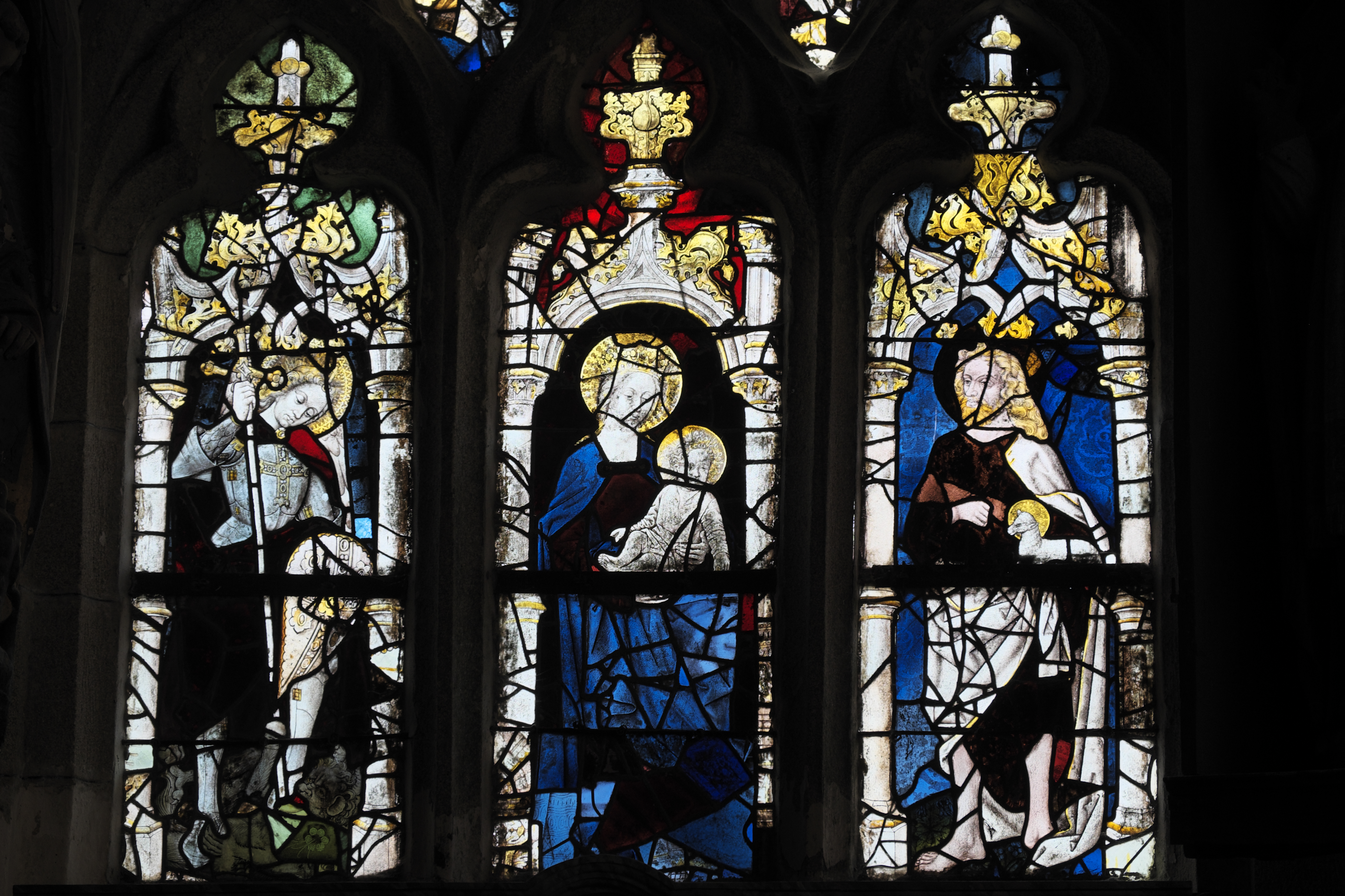 Katholische Kirche Saint-Fiacre in Guengat im Département Finistère (Region Bretagne/Frankreich), Bleiglasfenster (baie 2) um 1500; Darstellung: Erzengel Michael, Madonna mit Kind, Johannes der Täufer